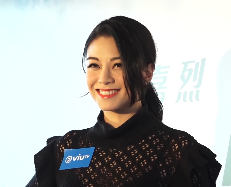 粵語: 廖碧兒身着通花衫透黑Bra出席劇集《瑪嘉烈與大衛系列 前度》發布會